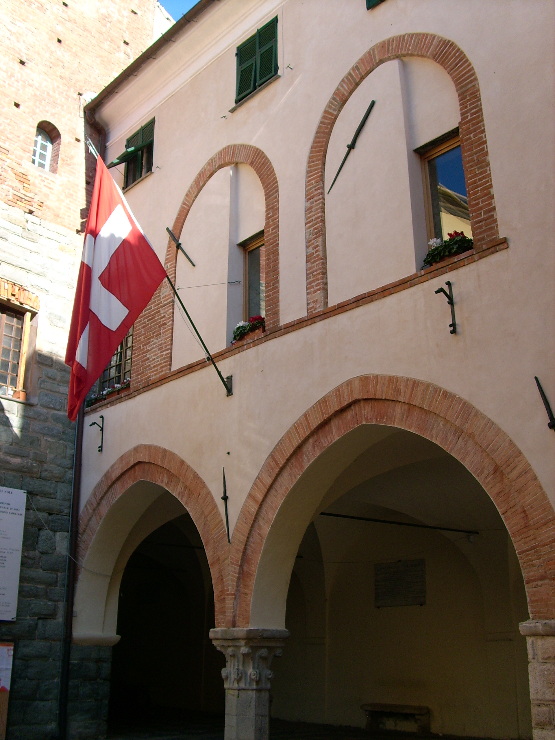 Palazzo della Repubblica di Noli, Liguria, Italy